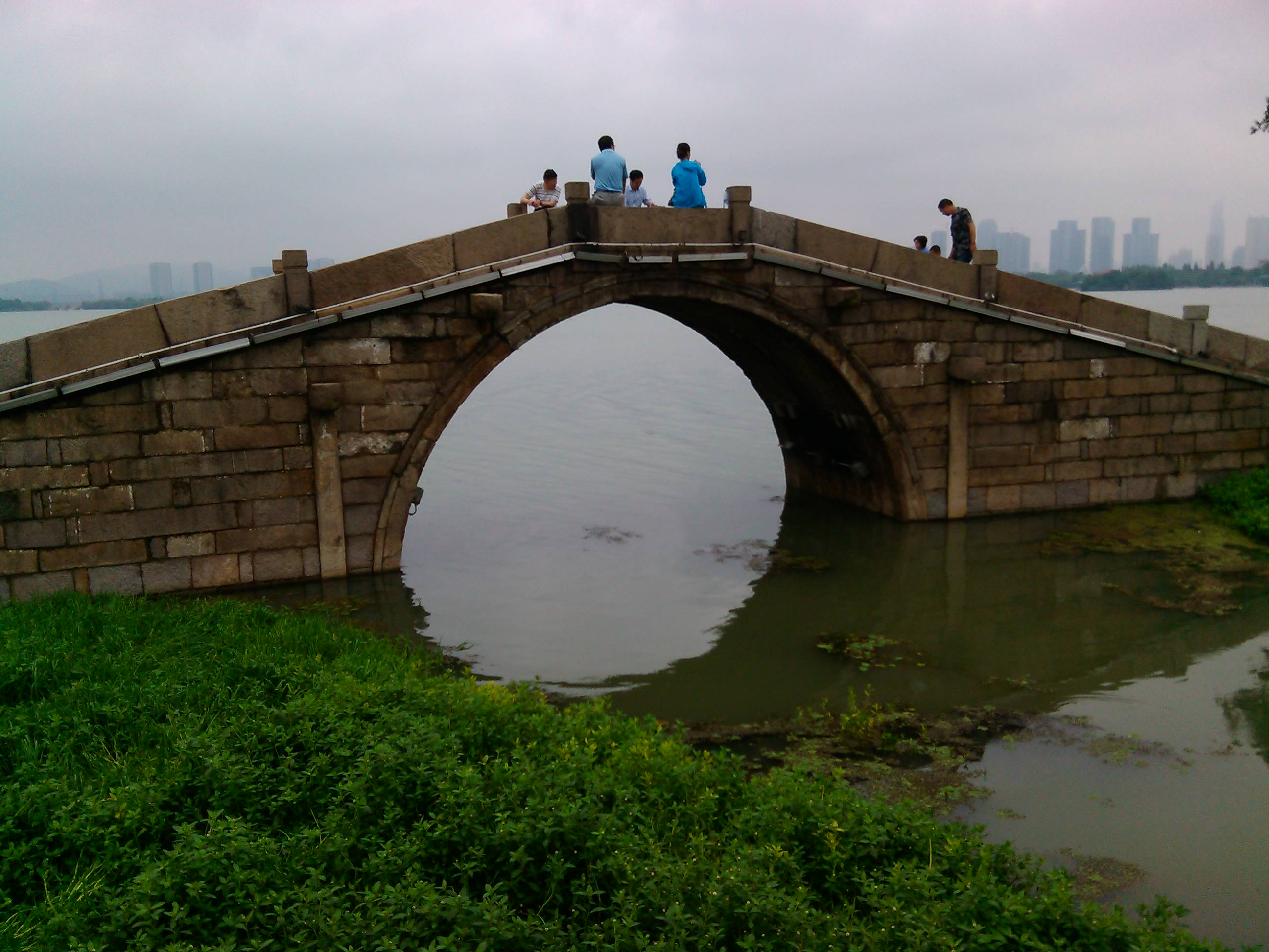 Binhu, Wuxi, Jiangsu, China